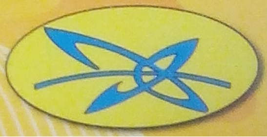 Logo Galeri Warisan SKS